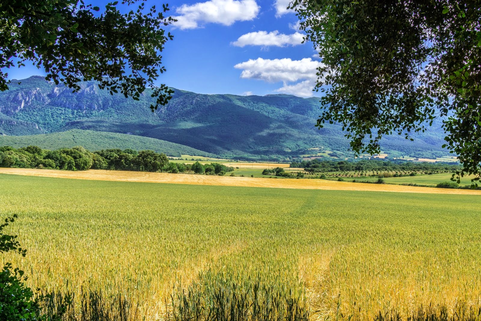 Campezo / Kanpezu, Araba, Spain